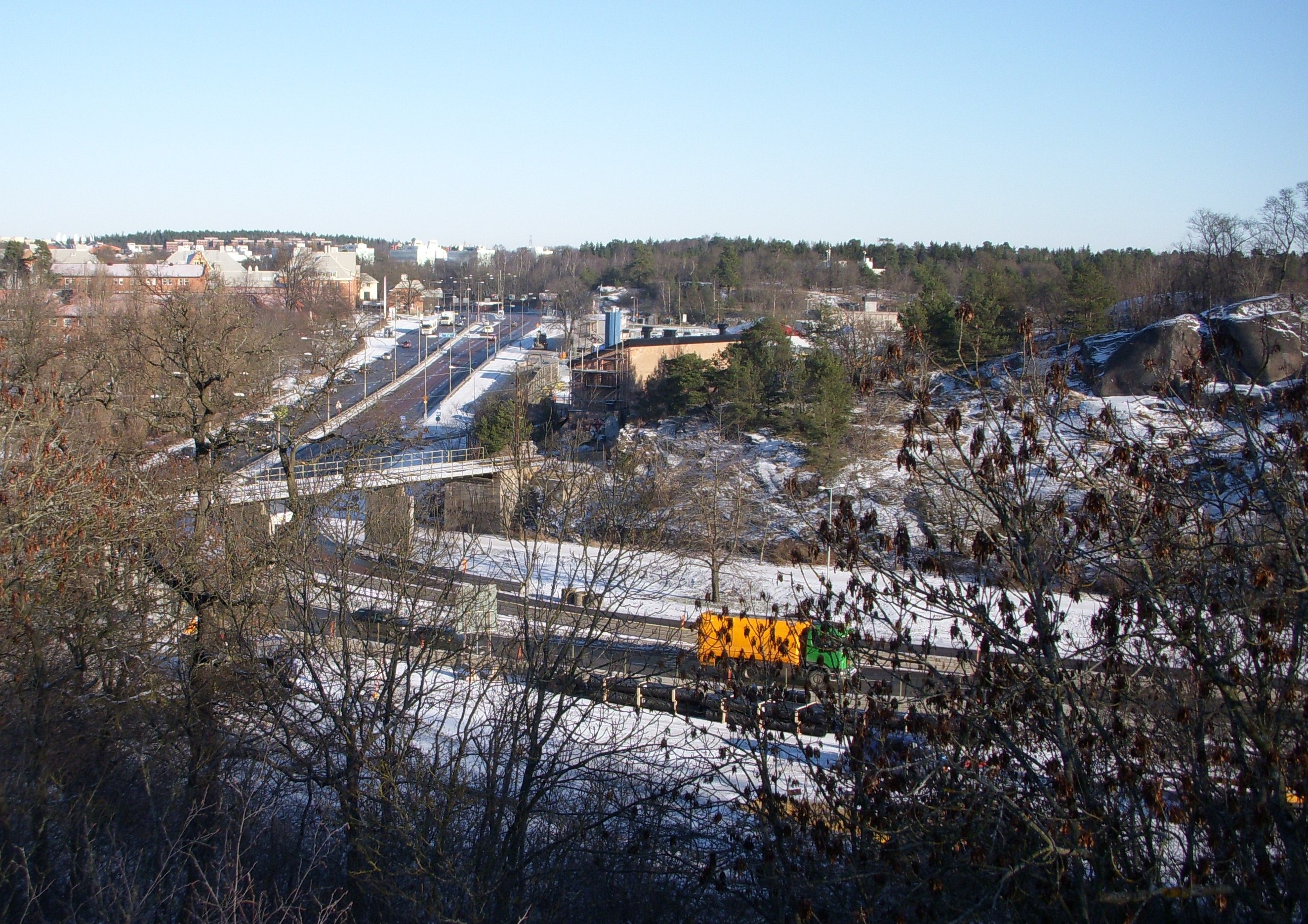 Roslagsvägen norrut från Bellevue i Stockholm